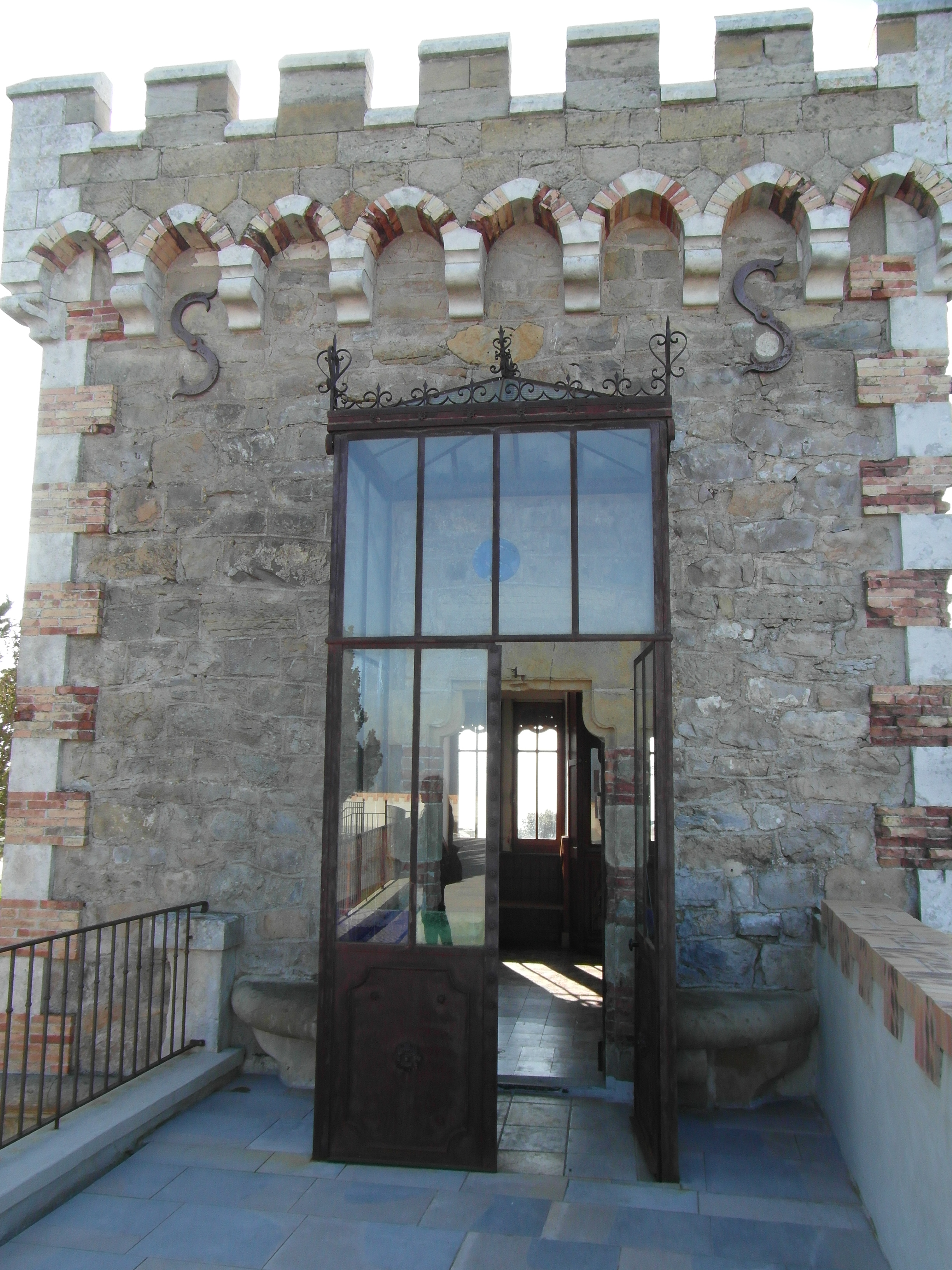 Tour Magdala (détail)